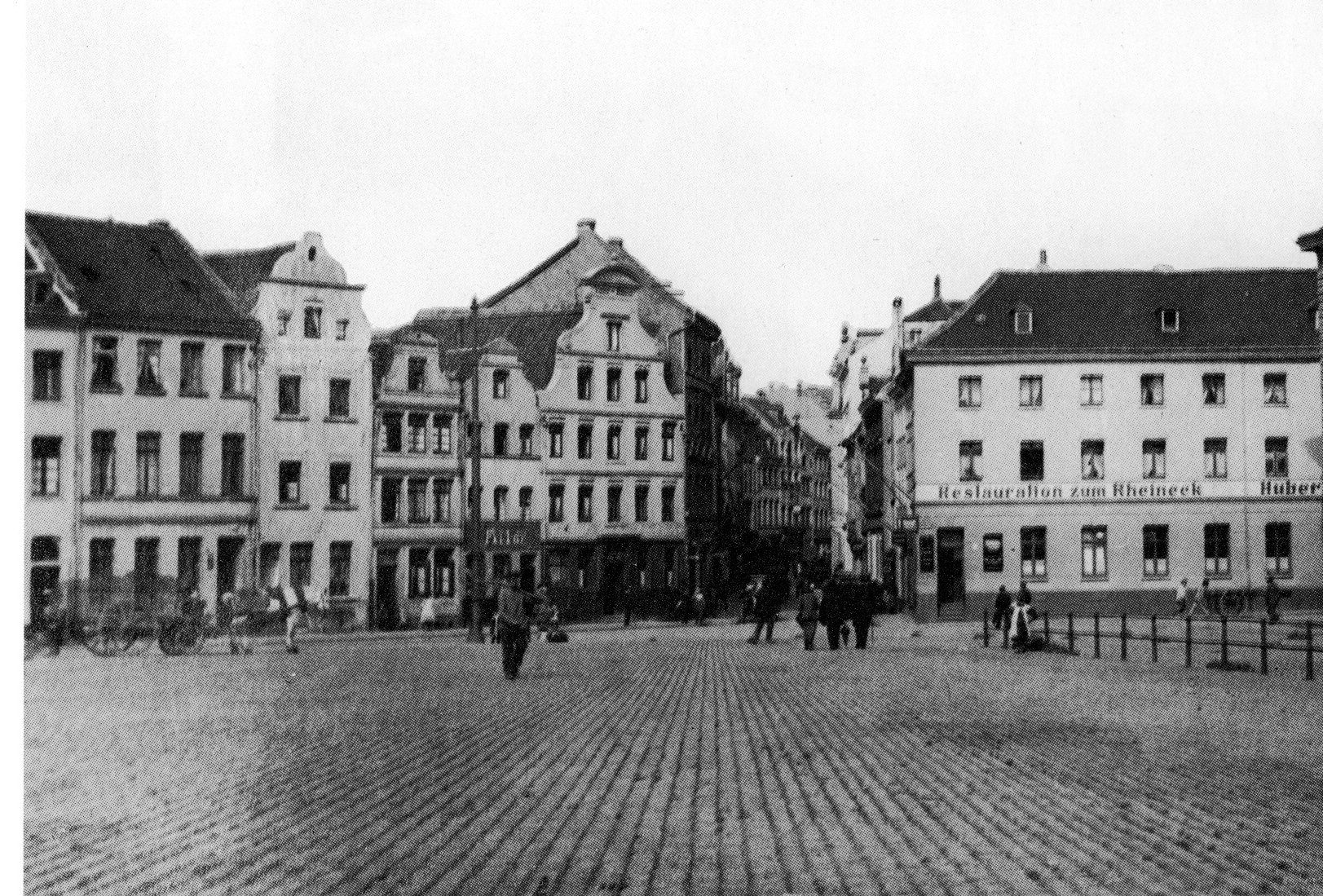 t